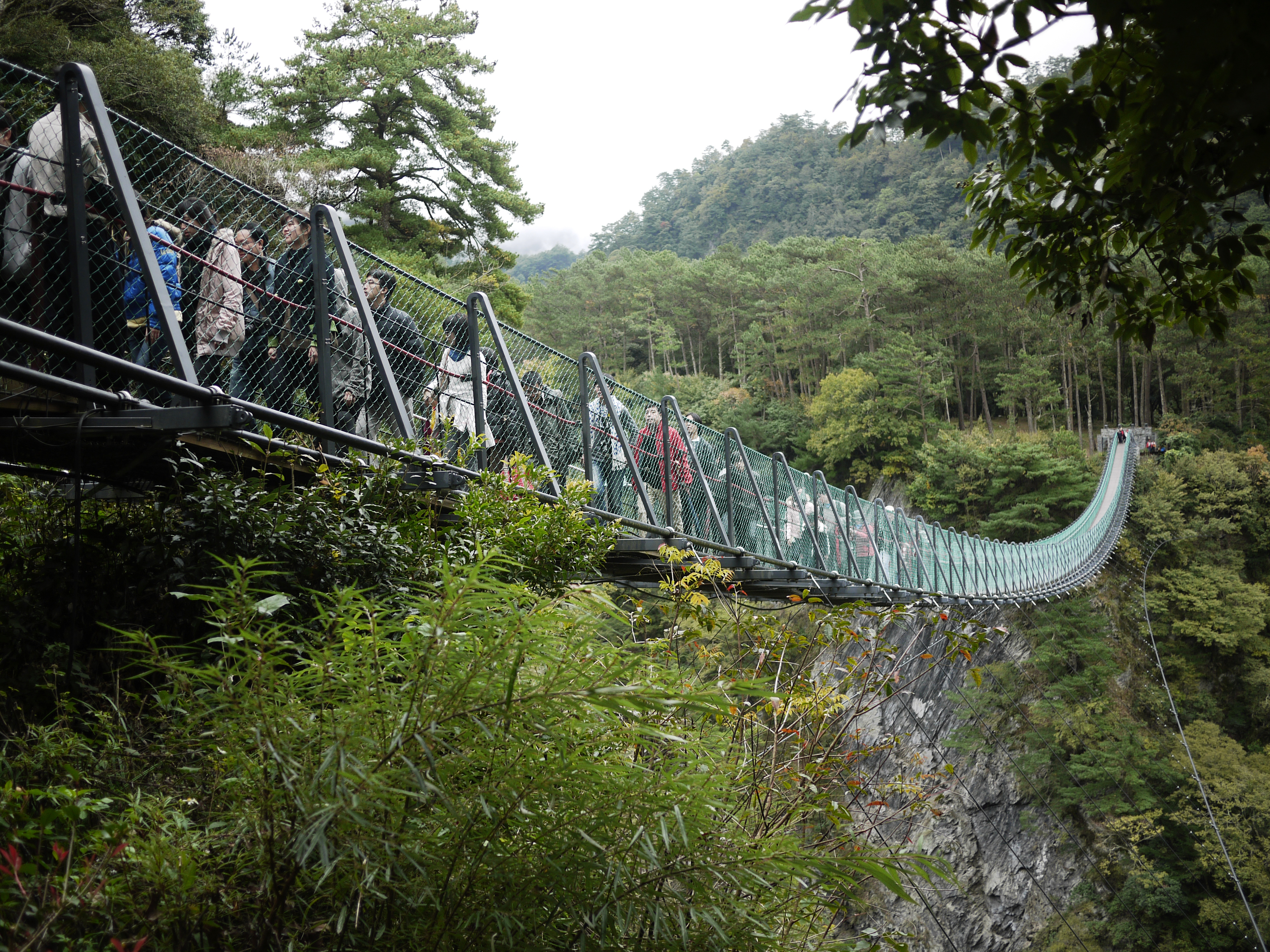 中文（台灣）: 奧萬大天梯